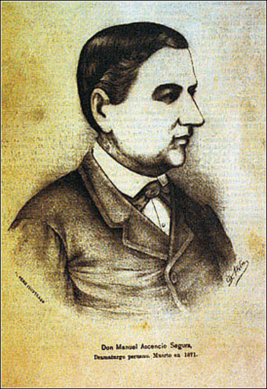 Manuel Ascensio Segura